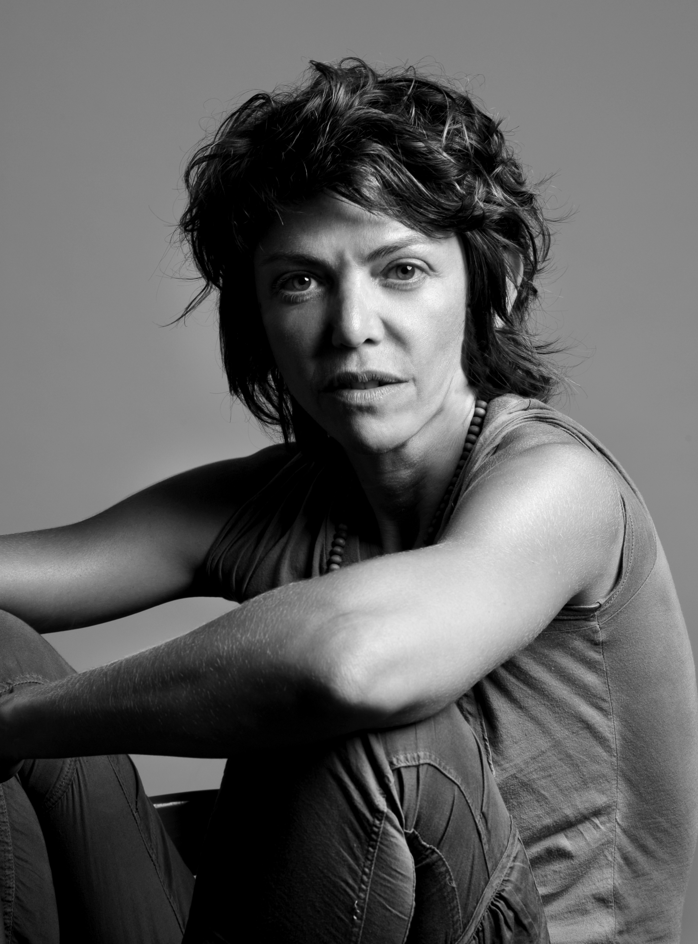 האמנית מרים כבסה